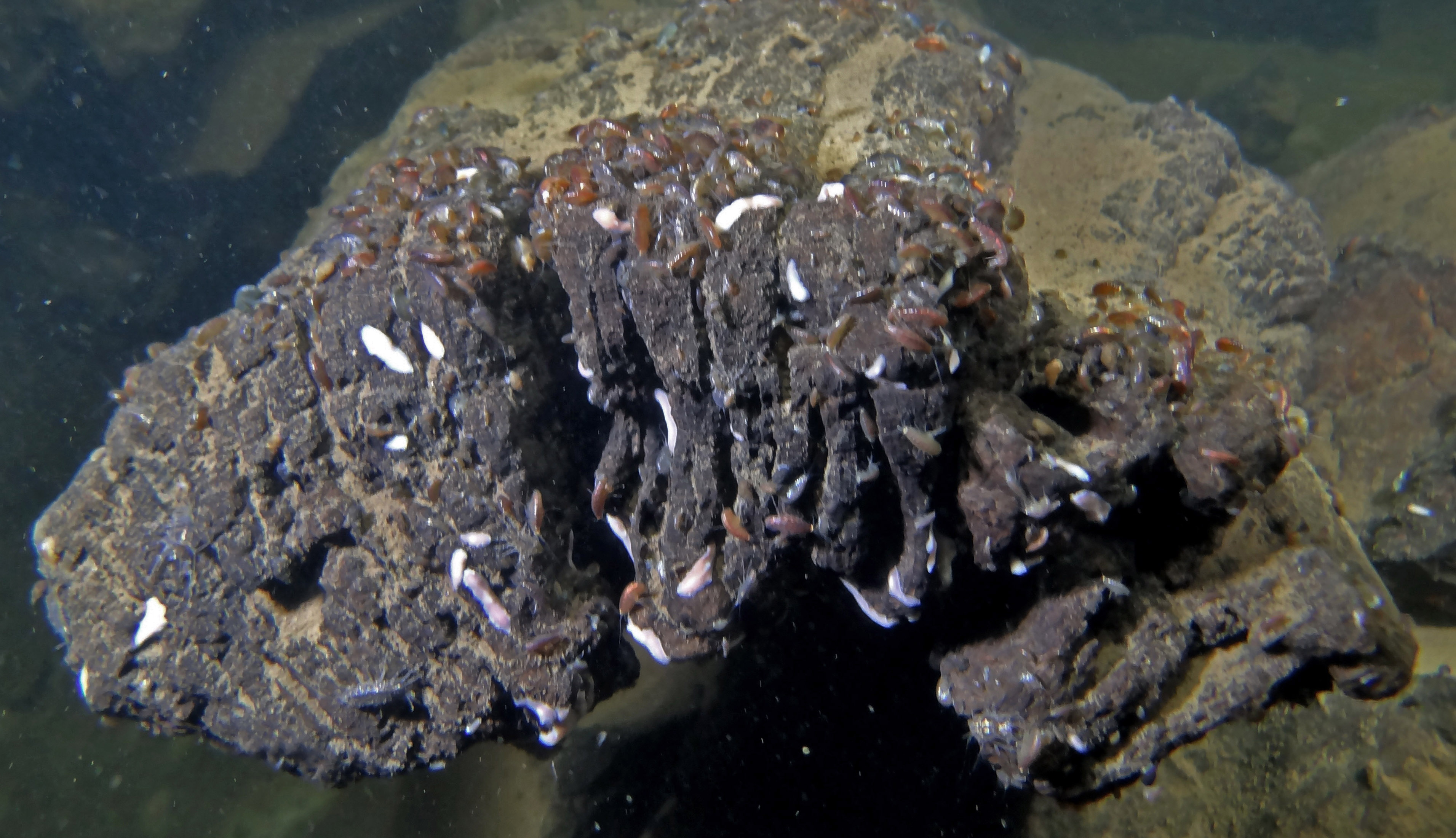 Planaires blancs et gammares (de plusieurs classes d'âge), réunis en groupes, dans une carrière inondée par une quarantaine de mètres d'eau (Carrière de Barges à Tournai en Belgique ; profondeur photo : -37 m), à extrémité d'un morceau de bois.